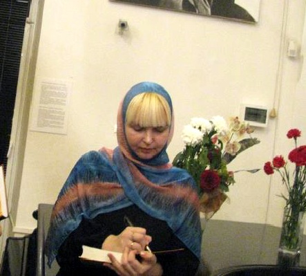 Полина Жеребцова в музее А. Сахарова. Презентация книги.